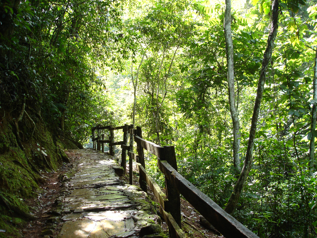 Parque Nacional Guatopo. Estado Guárico, Venezuela